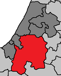 Localização da Província de Khémisset, dentro da Região de Rabat-Salé-Kénitra